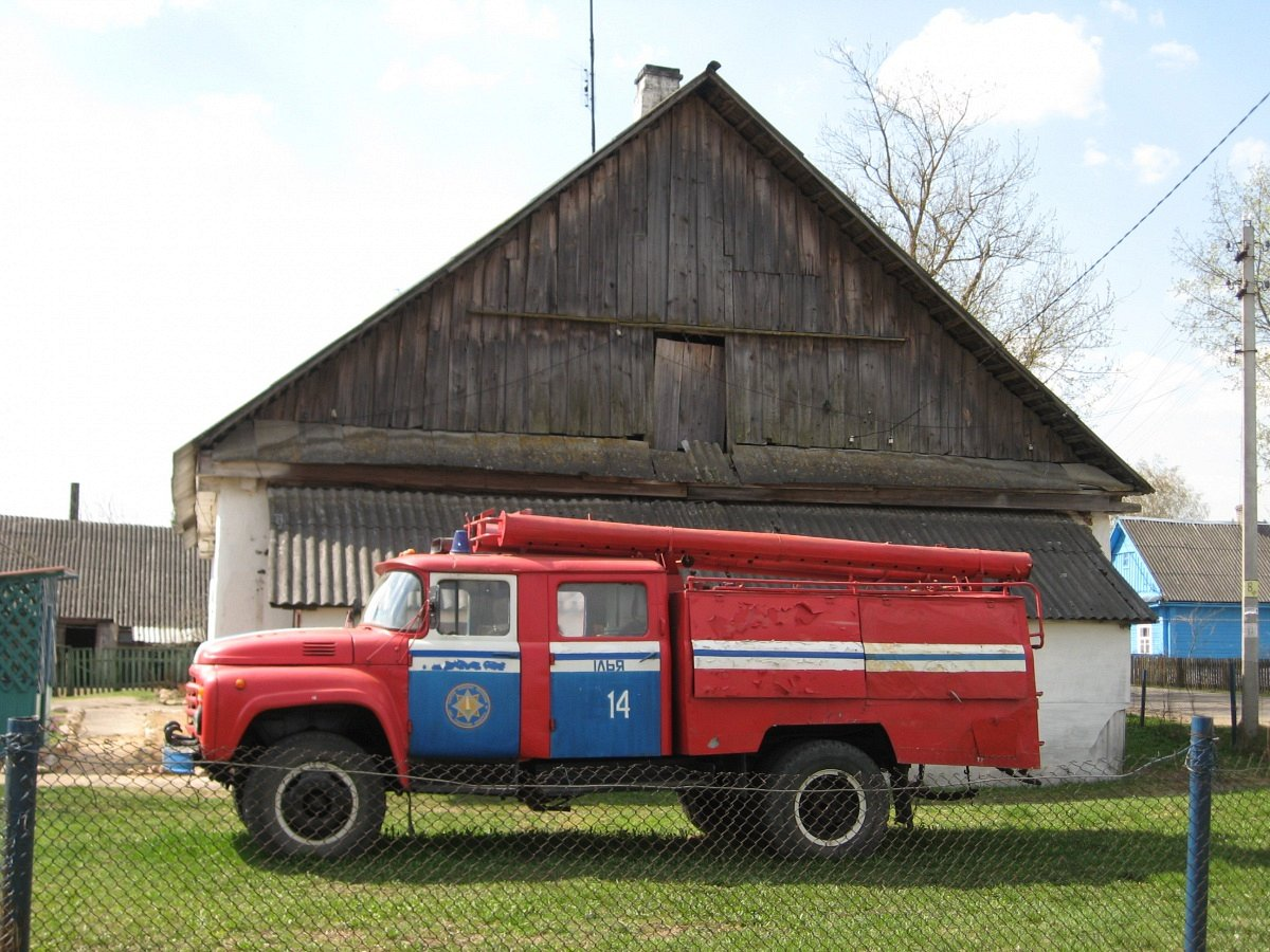 Ілья. Пажарнае дэпо